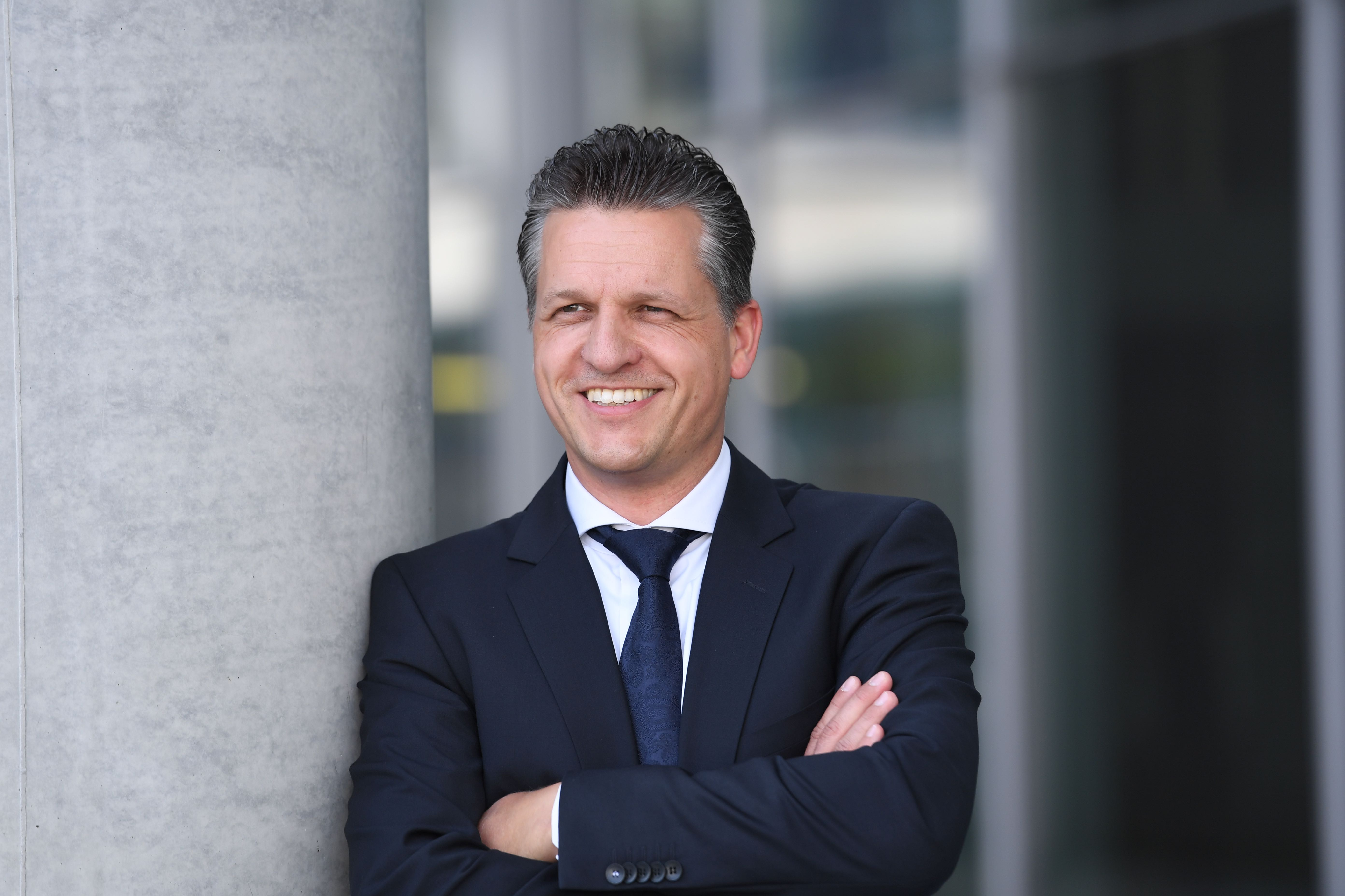 Thorsten Frei MdB (2017)